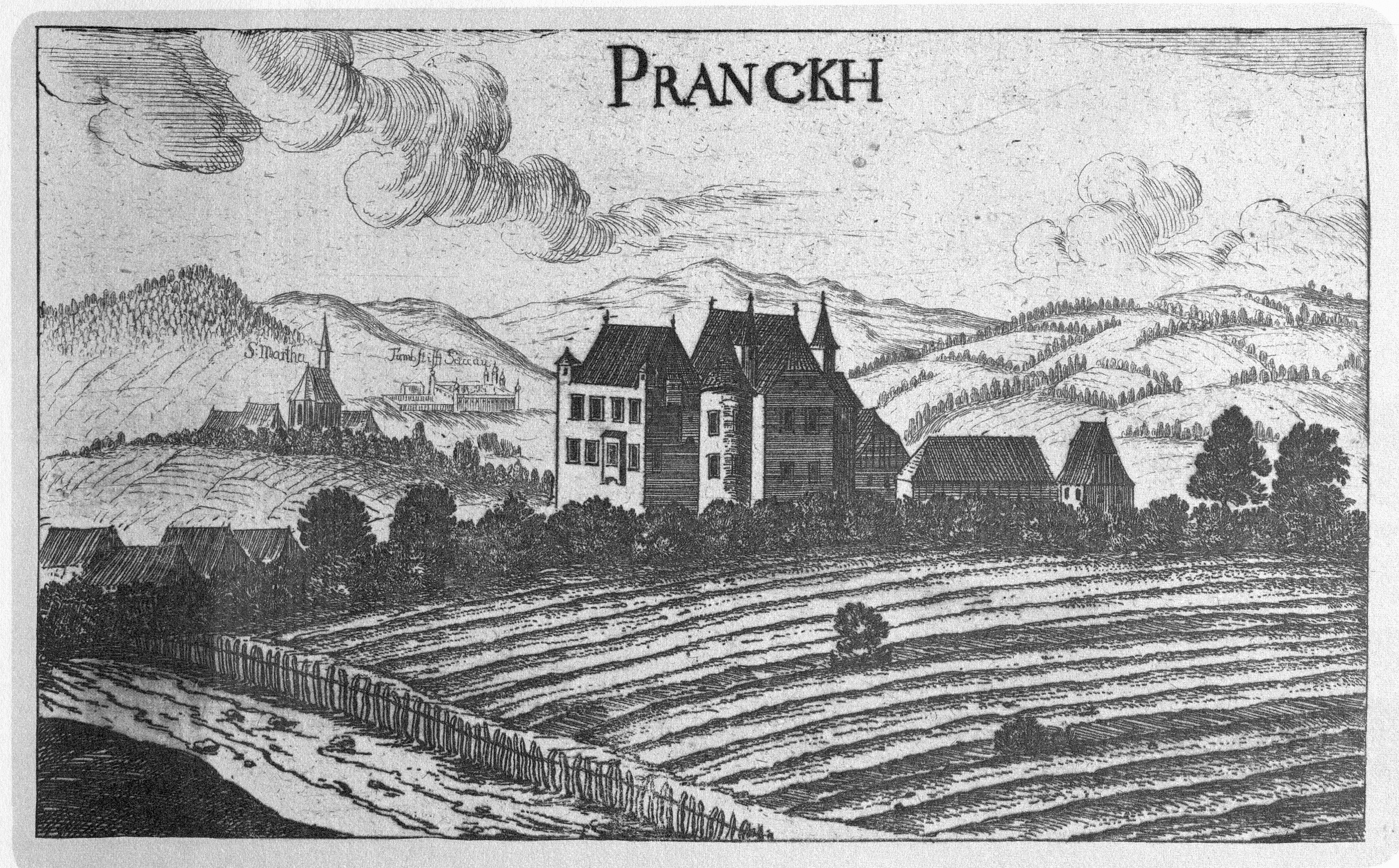 G. M. Vischers Käyserlichen Geographi, Topographia Ducatus Stiriae, Das ist: Eigentliche Delineation / und Abbildung aller Städte / Schlösser / Marcktfleck / Lustgärten / Probsteyen / Stiffter / Clöster und Kirchen / so es sich im Herzogthumb Steyrmarck befinden; Und anjetzo Umb einen billichen Preyß zu finden seynd Bey Johann Bitsch Universitäts Buchhandlern / Auff dem Juden=Platz bey der guldenen Saulen. Graz 1681 Die Nummerierung der Dateien folgt der alphabetischen Reihung der Ortsnamen und entspricht nicht dem Vischer-Register